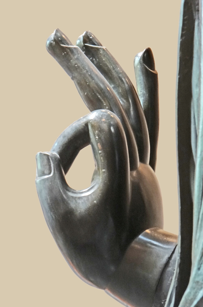 La main droite du Bouddha Amitabha ou Amida (détail) faisant la Jnana Mudra (le geste de l'enseignement) Amida Nyorai Bronze Japon, Tokyo, quartier de Meguro, Banryuji XVIIIIè siècle Epoque Edo (1605-1867) Legs Henri Cernuschi, 1896 Cette grande statue de Buddha Amida provient d’un petit temple du quartier de Meguro à Tokyo, le Banryûji . Ce temple dépendait d’un monastère, le Enzanji, de la secte Jôdo du bouddhisme amidiste. Elle est aujourd'hui présentée dans la salle principale du musée Cernuschi à Paris Site du musée Cernuschi (ville de Paris)